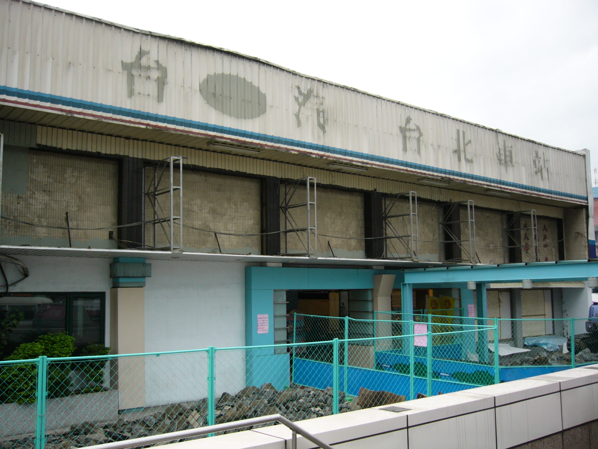 中文（台灣）: 台灣汽車客運公司台北車站，即今國光客運台北西站。